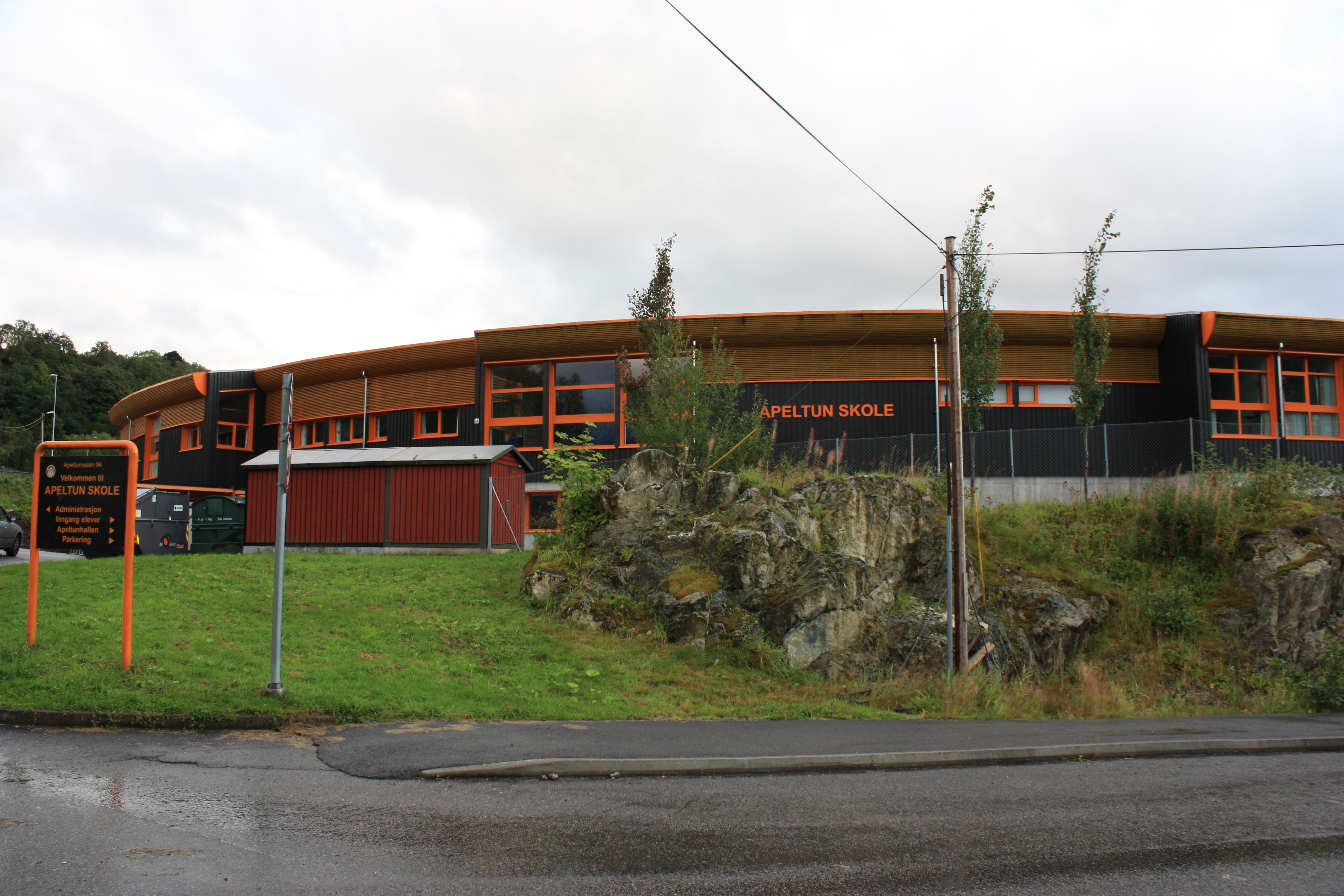 Apeltun skole, Fana, Bergen.